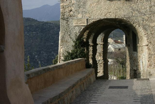 La piazza di Borgio Verezzi, Liguria, Italia